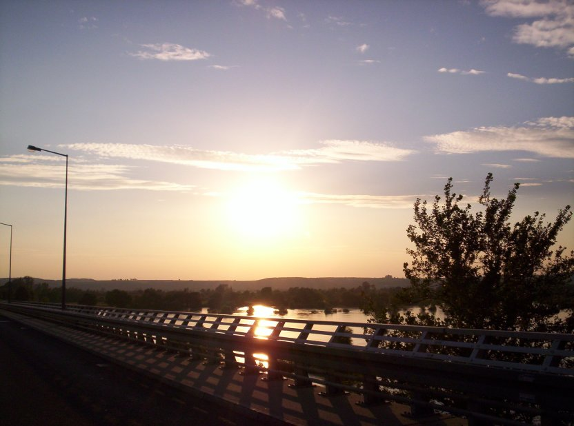 Most na Wiśle w Annopolu